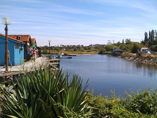 Marais salants d'Oléron (Le Grand-Village-Plage, Charente-Maritime, France).